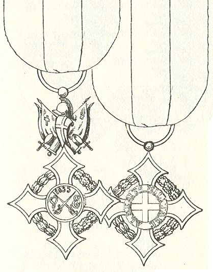 Scan van Blz. 173 van het boek "Handbuch der Ritter- und Verdienstorden " uitgegeven 1893 door Weber.Tekening van de in 1902 overleden Maximilian Gritzner. Robert Prummel 10 jul 2008 16:40 (CEST)